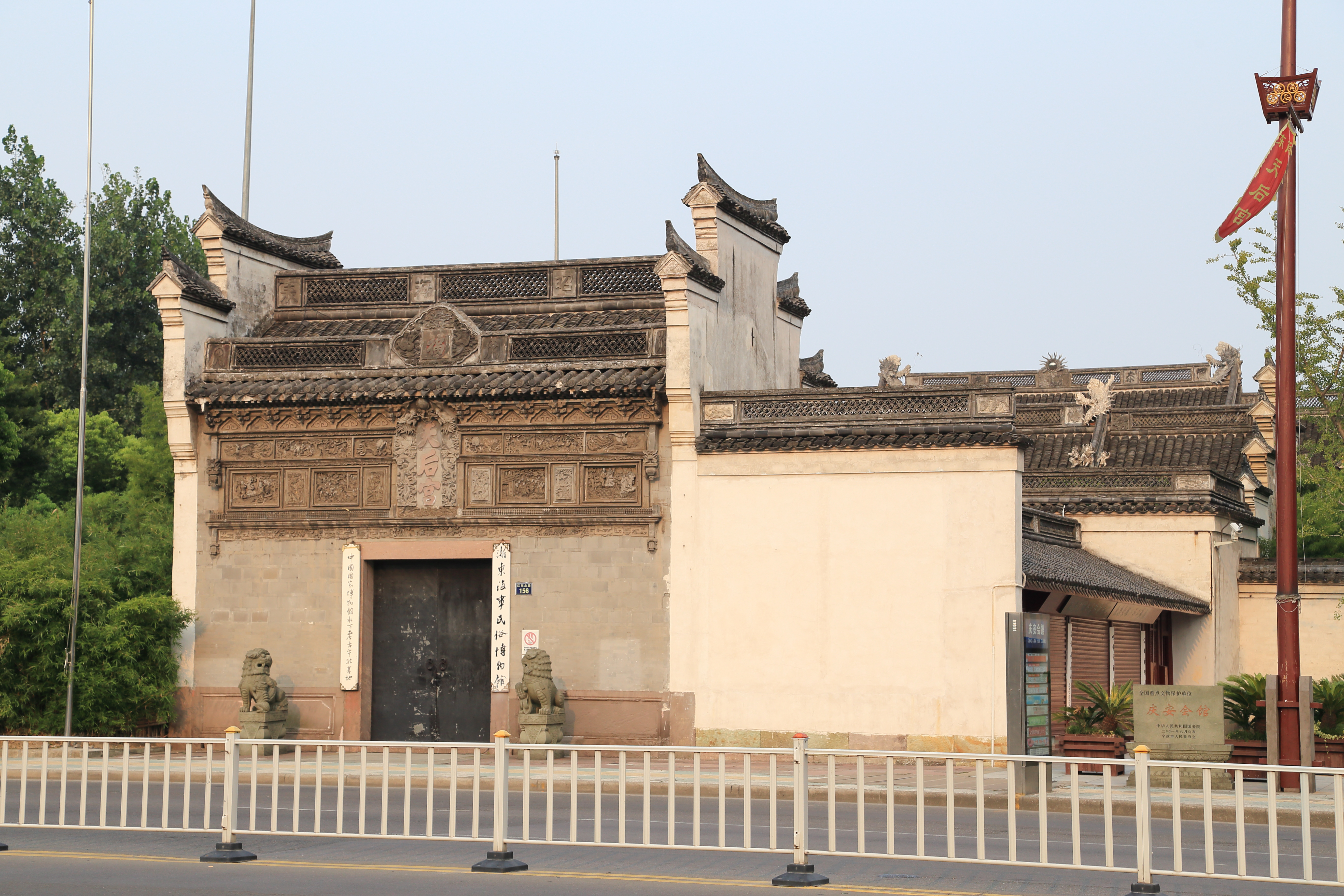 宁波庆安会馆